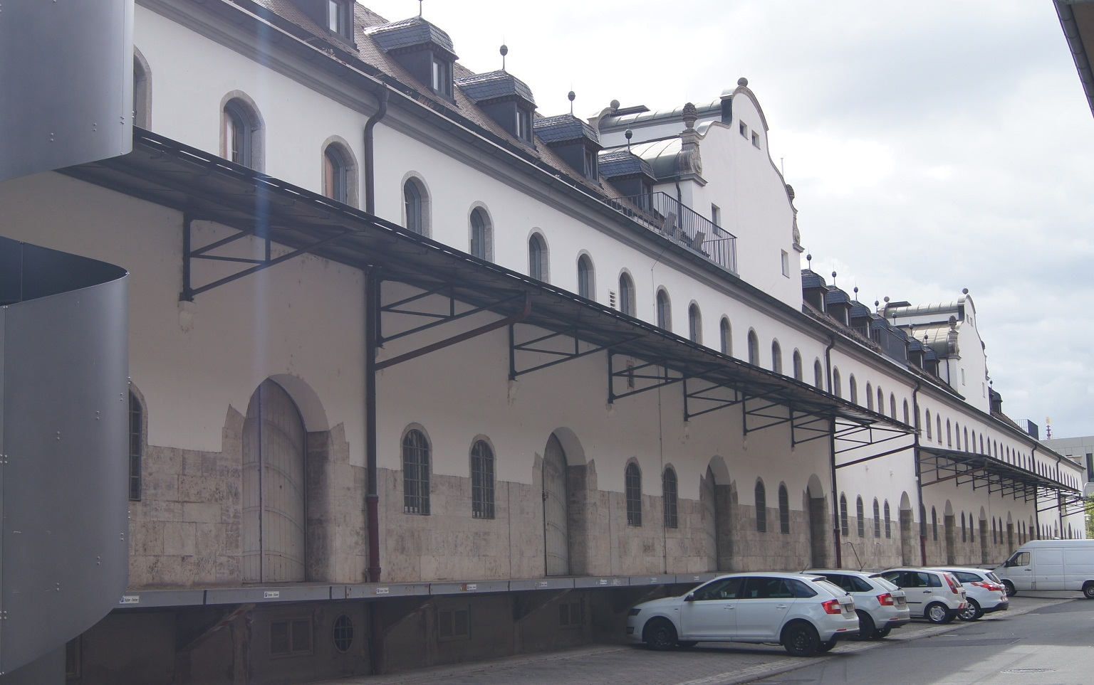 ehemaliges Hauptzollamt in Würzburg, Lagerhalle